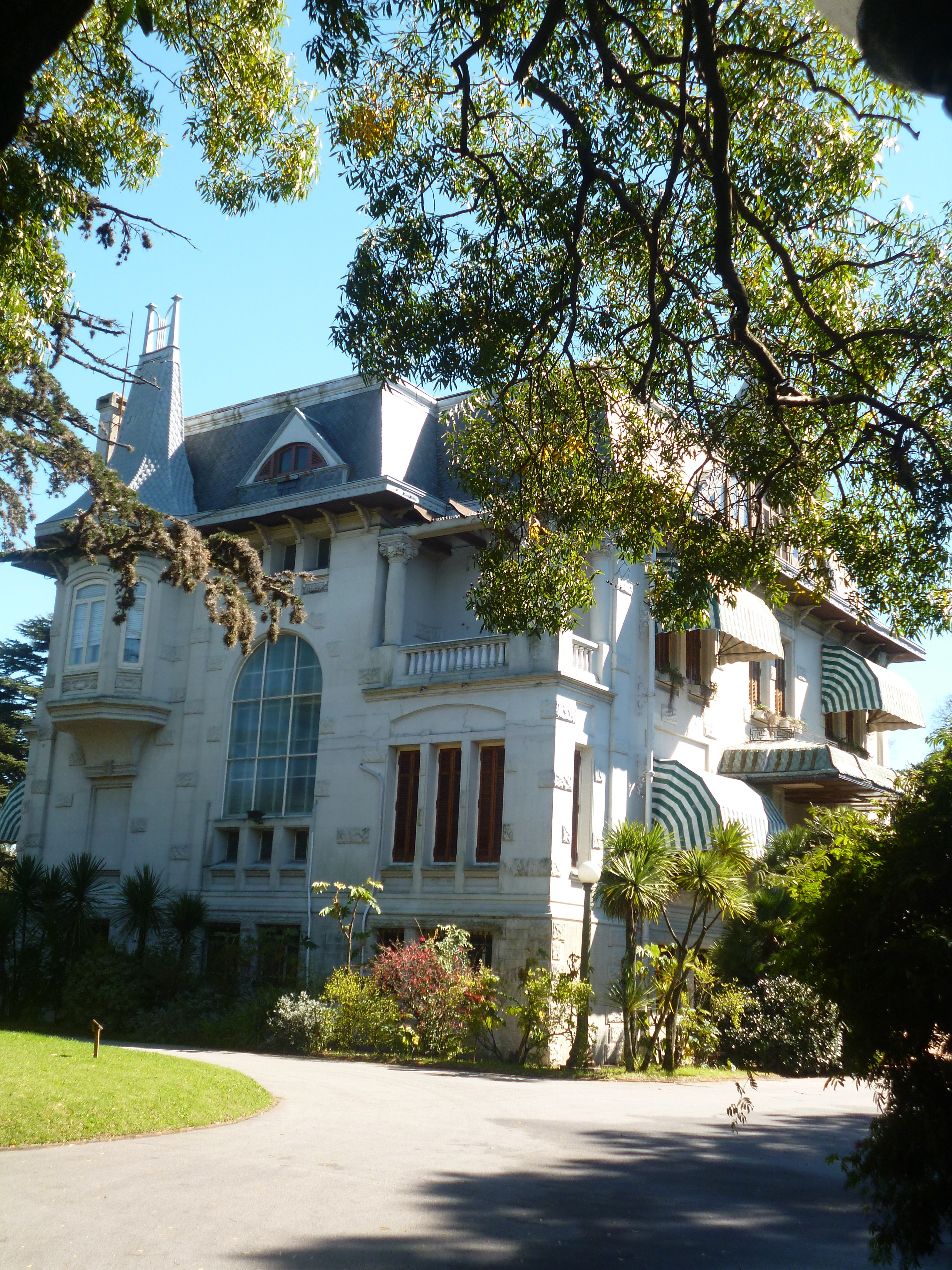 Casa Quinta de Susviela Guarch - Residencia Presidencial. Ubicada en el departamento de Montevideo